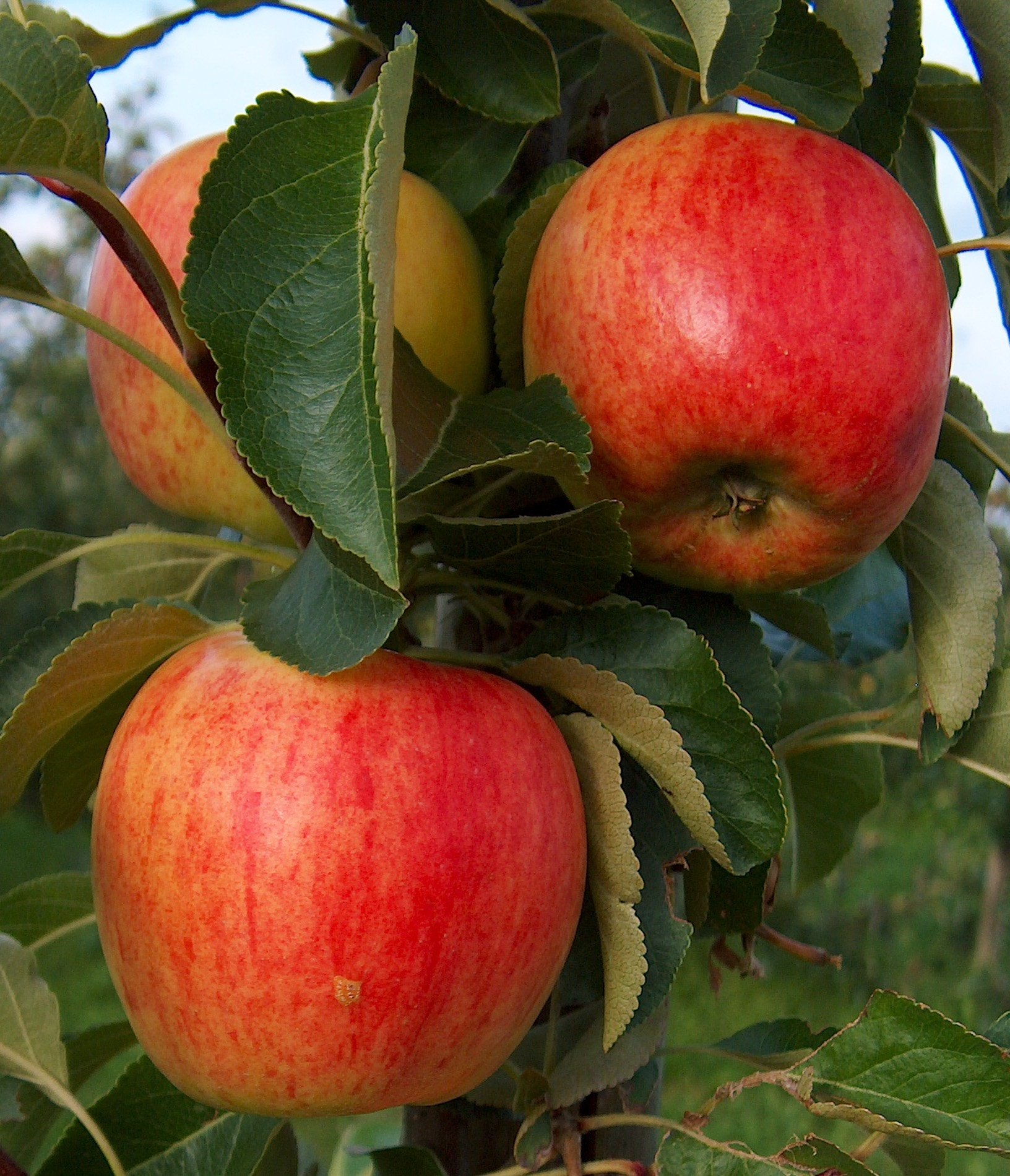 Äpfel der Sorte Nela am Baum